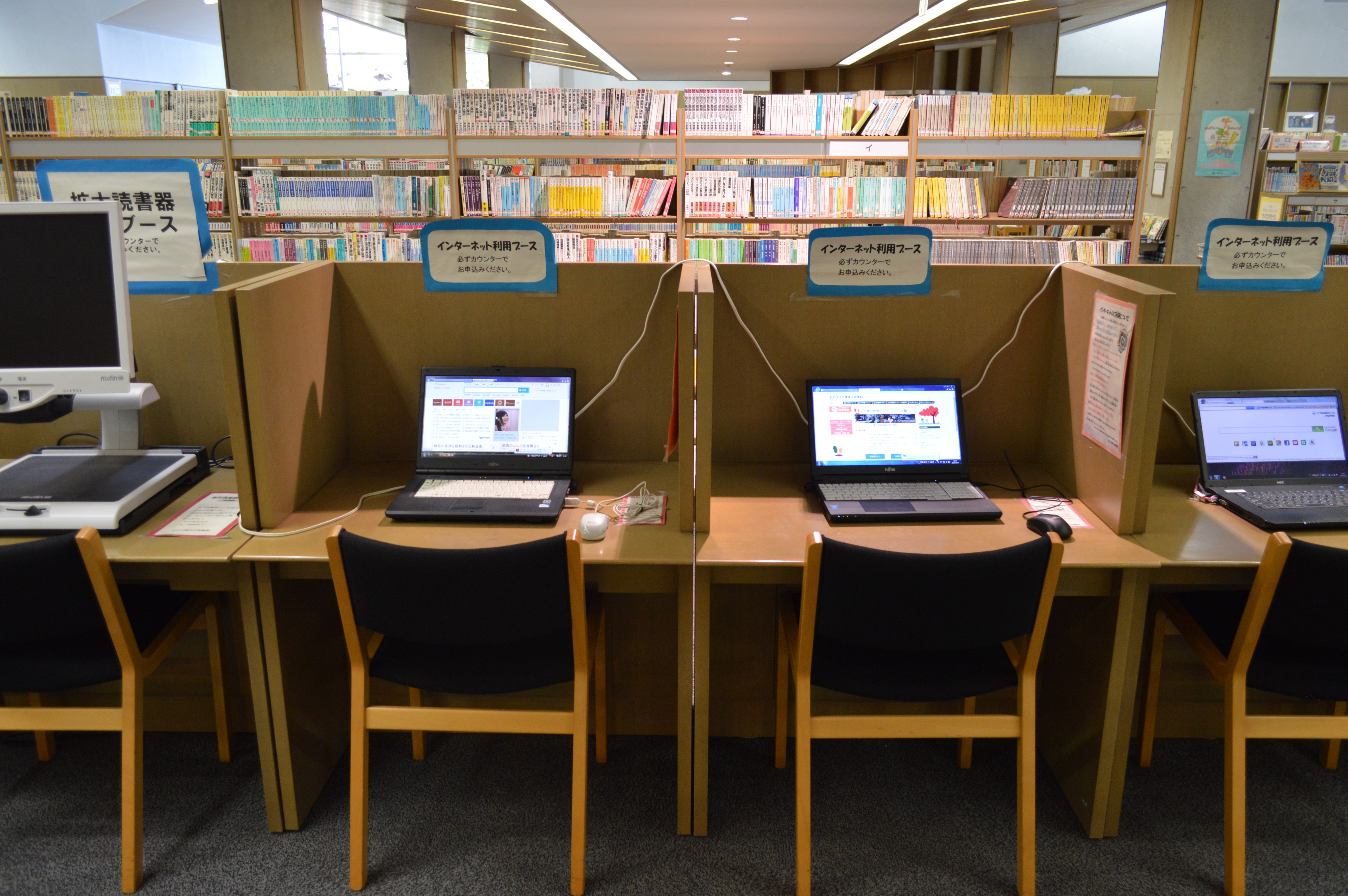 近江八幡市立近江八幡図書館。AVコーナー。拡大読書器ブース（1席）とインターネット利用ブース（3席）。